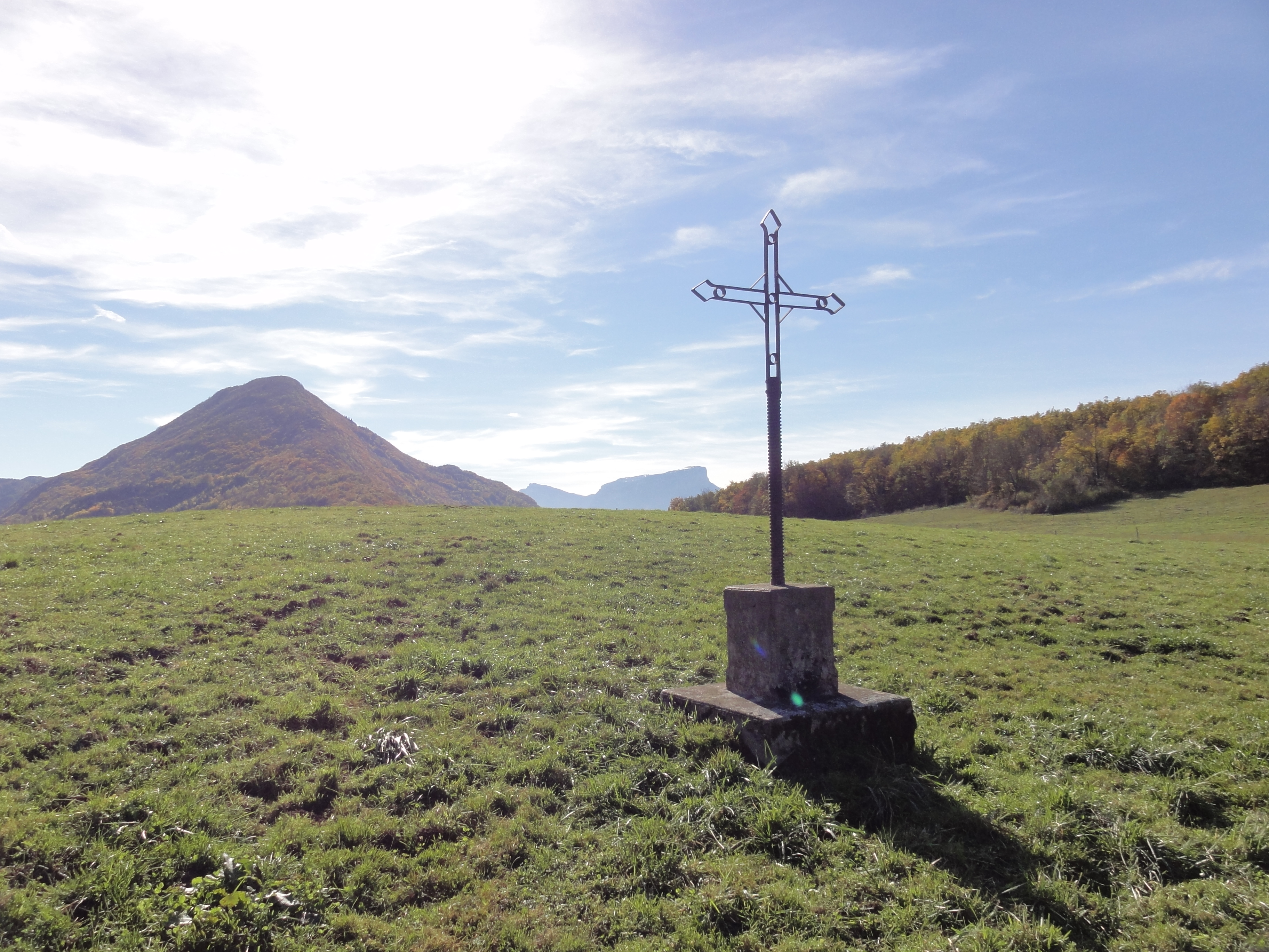 Croix sitiuée au bas de la colline de Miradou au sud-ouest du chef-lieu.